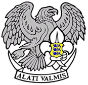 Kotkamärk